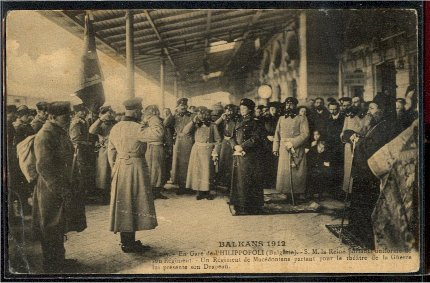 Връчване на главното знаме на Македоно-одринското опълчение от царица Елеонора